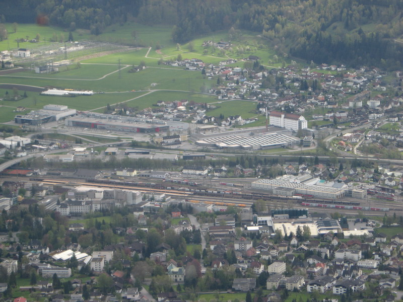 Blick auf Bürs vom Muttersberg aus gesehen; aller oberhalb des Bahngleises gehört zum Ortsgebiet